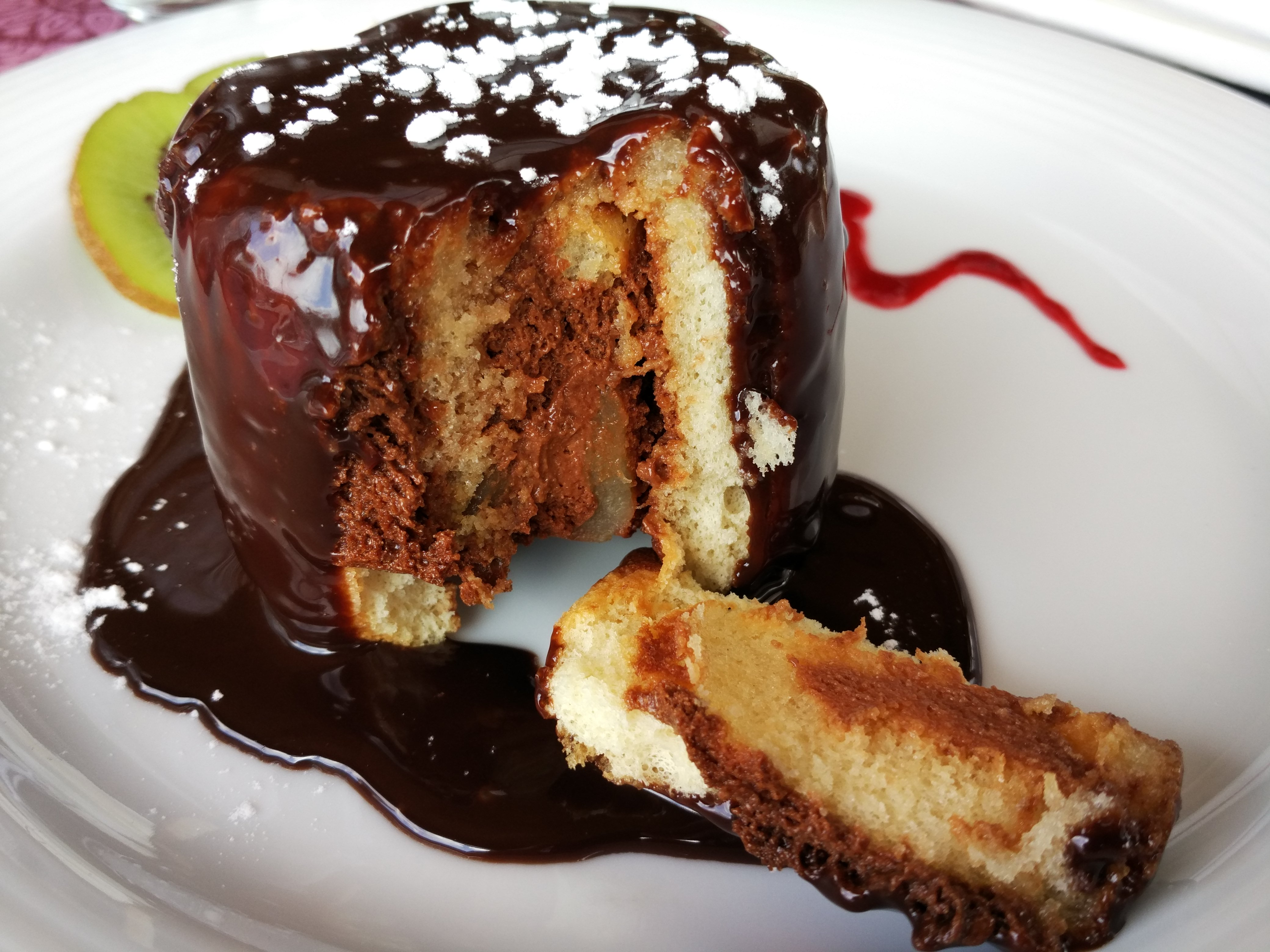 Charlotte aux poires et chocolat. On voit clairement le biscuit à la cuillère et la construction du gateau